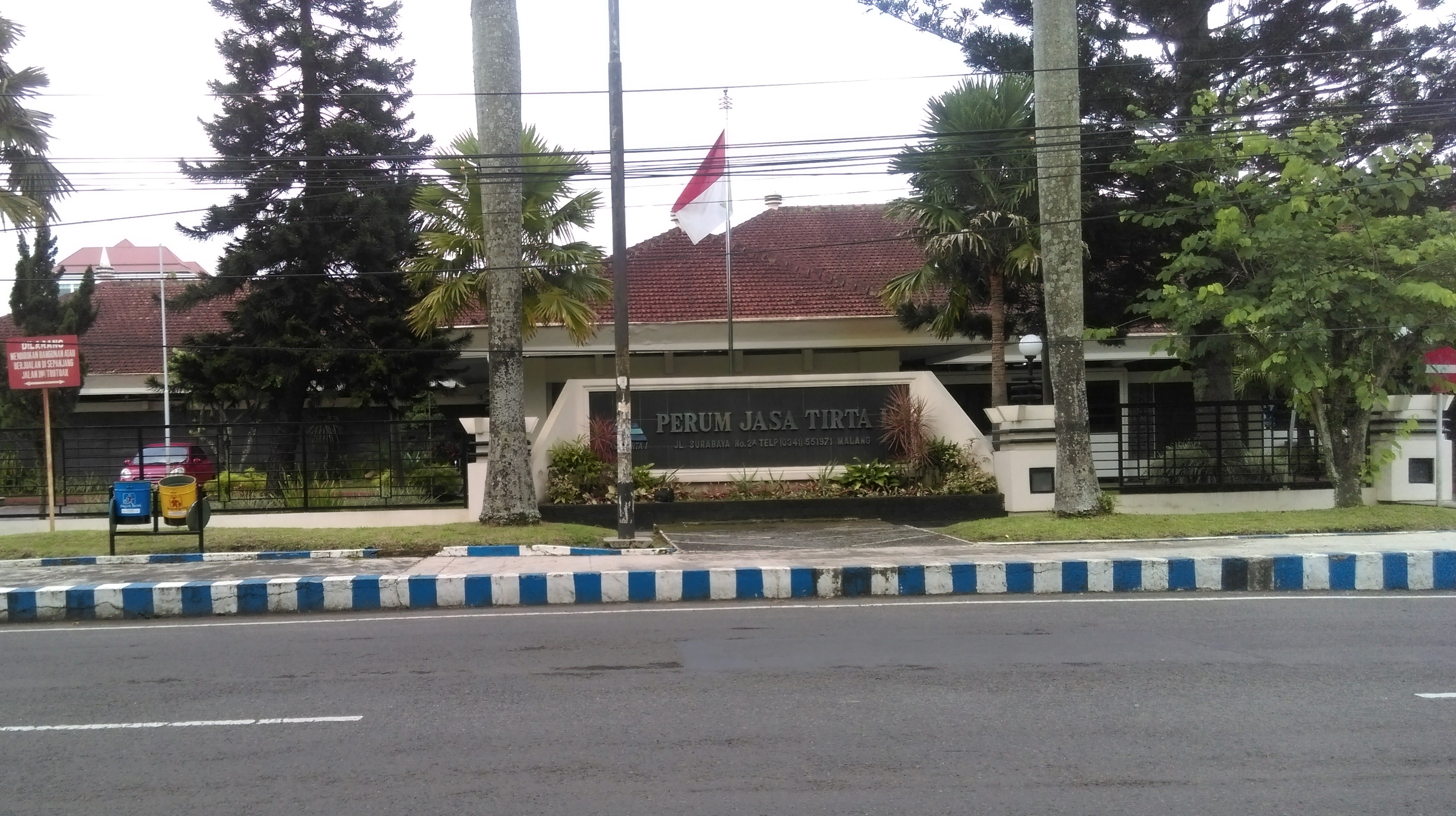 2017-12-07 Kantor Pusat Jasa Tirta I